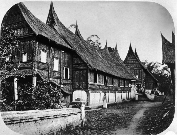 Foto. Minangkabau-huis van Radja Mengkoeloe te Kotagedang nabij Fort de Kock, Sumatra.